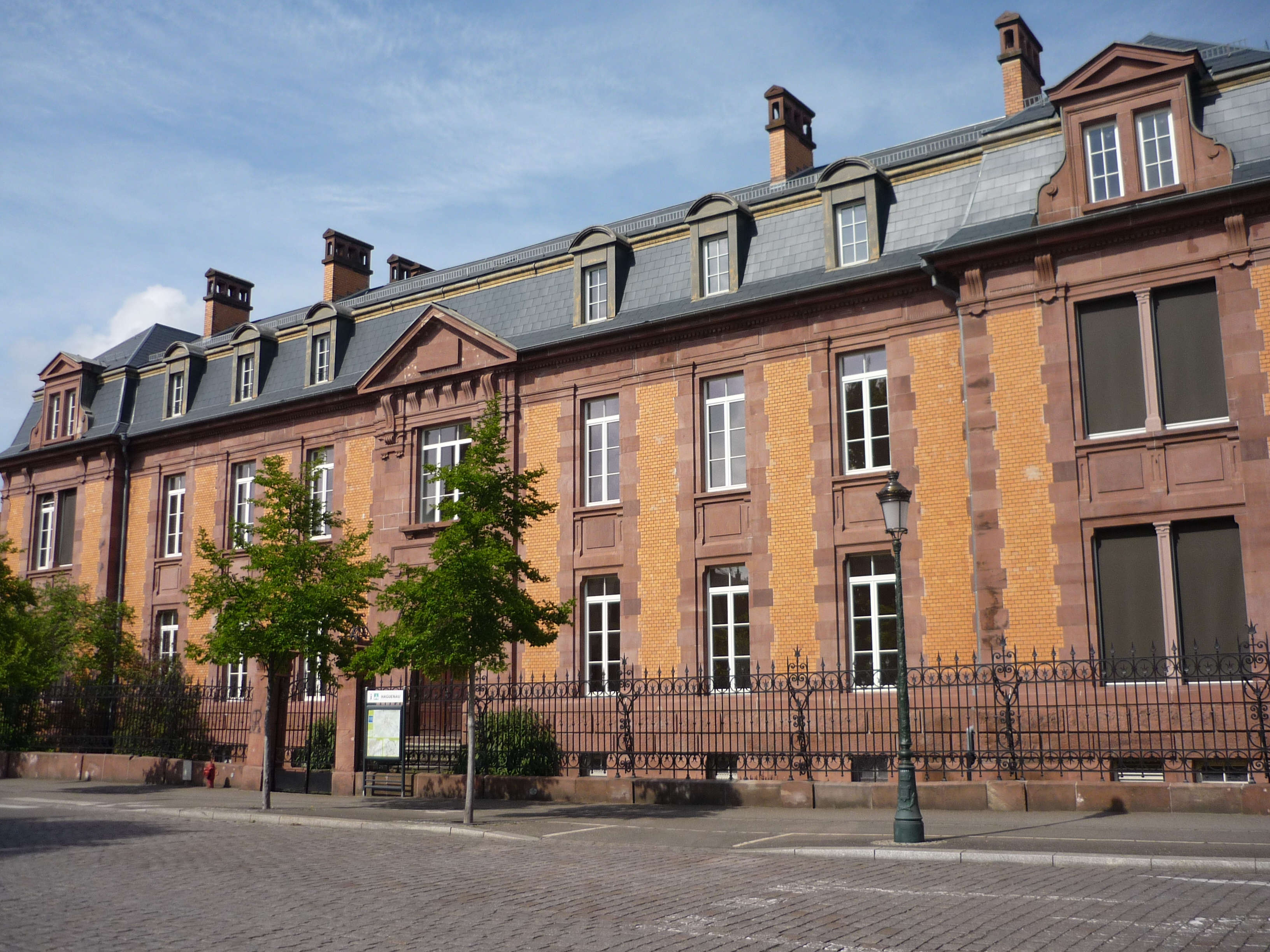 Ancien Gymnasium, actuel collège Foch de Haguenau (1900)